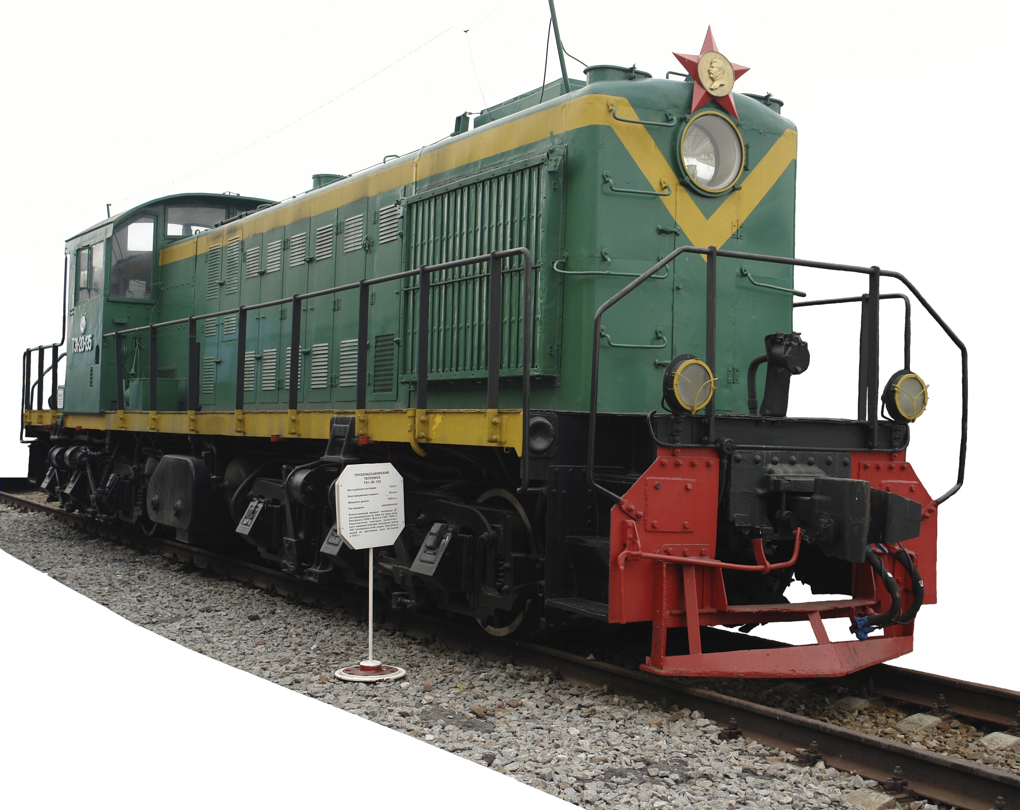 Грузопассажирский тепловоз ТЭ1-20-135 Вес в рабочем состоянии123,9Конструкционная скорость93 км/чМощность дизеля1000 л.с.Тип передачиэлектрическая Отечественный вариант тепловоза Д, поставлявшегося из США по ленд-лизу. Построен в 1949 г. Всего в 1947-1950 гг. Харьковском заводом транспортного машиностроения построено около 300 тепловозов этой серии. Поступил в музей из дистанции пути Осташков в 1991 г. Центральный музей Октябрьской железной дороги, Санкт-Петербург This is a retouched picture, which means that it has been digitally altered from its original version. Modifications: removed background (убран фон). The original can be viewed here: Freight and passenger diesel locomotive TE1-20-135 (2).jpg. Modifications made by Alex Alex Lep.